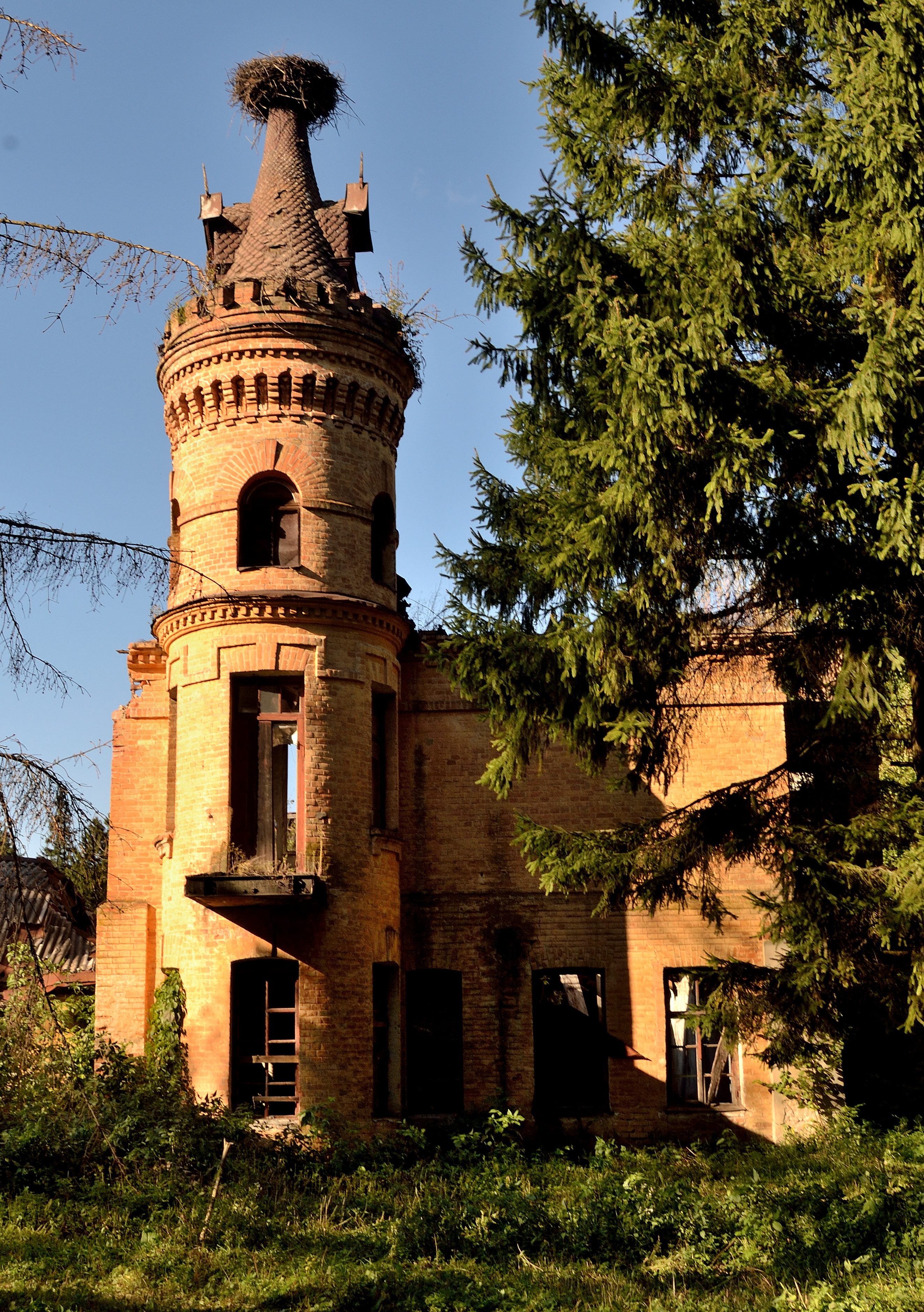 Господарський корпус (мур.), с. Турчинівка, вул. Житомирська, 6